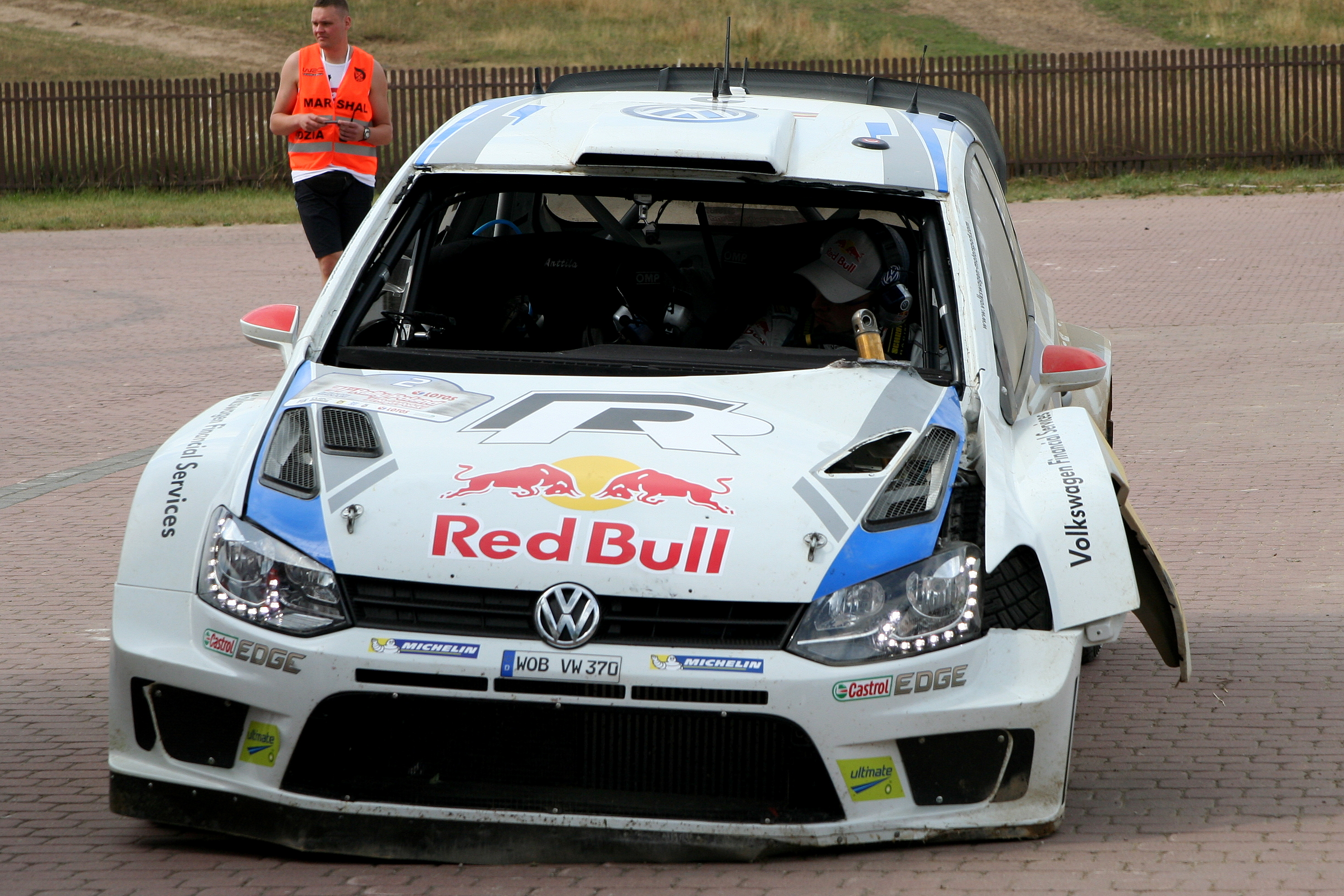 Jari-Matti Latvala po powrocie uszkodzonym samochodem z 15 OS Rajdu Polski 2014